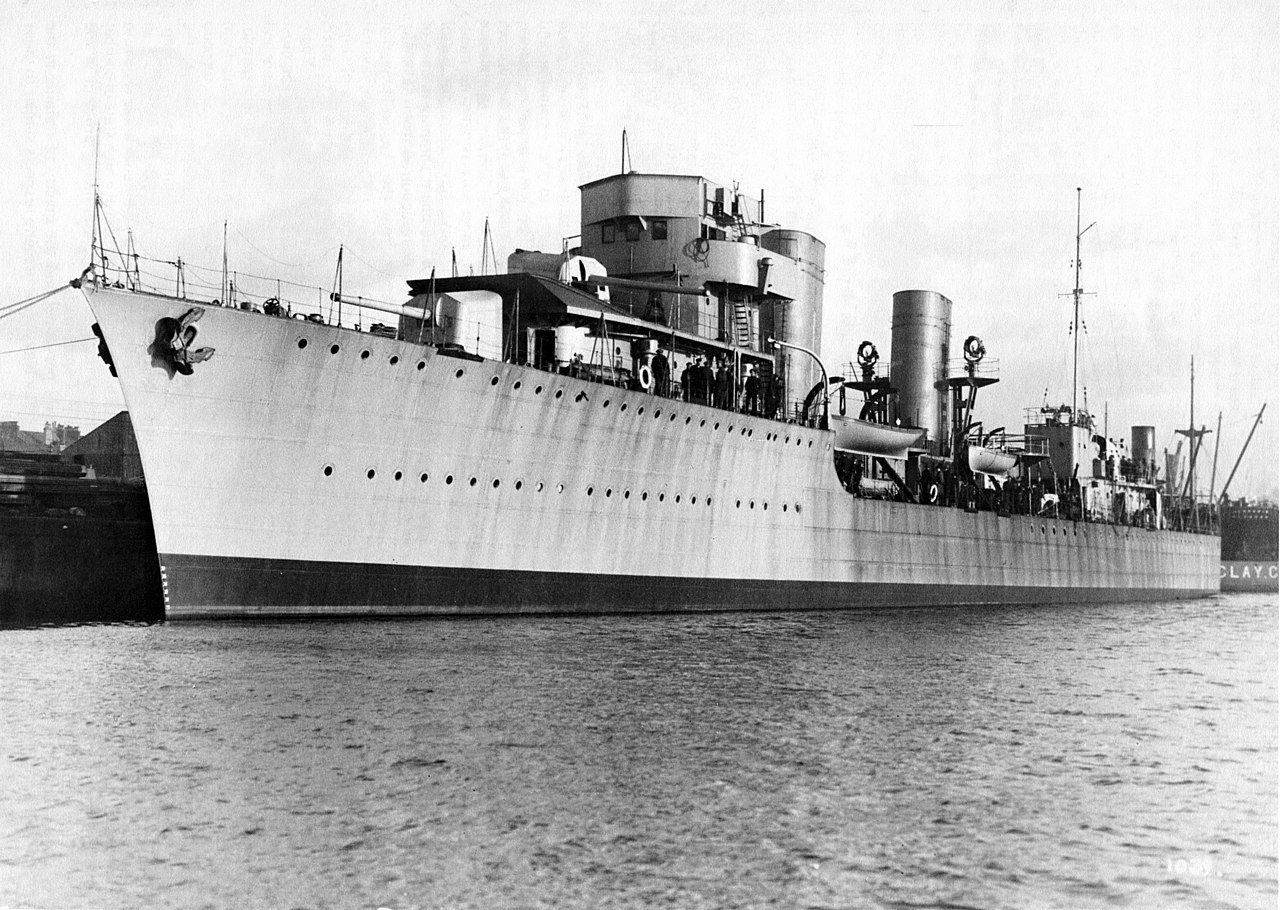 Разарач Дуборнвик током заршних радова у Глазгову 1932. Description Destroyer Dubrovnik during the final works in Glasgow 1932.Date early 1932 date QS:P,+1932-00-00T00:00:00Z/9,P4241,Q40719727Source Russian magazine Морская Кампания 2017 №1 (65) Югославские эсминцы второй мировойAuthor Unknown author Destroyer Dubrovnik during the final works in Glasgow 1932.